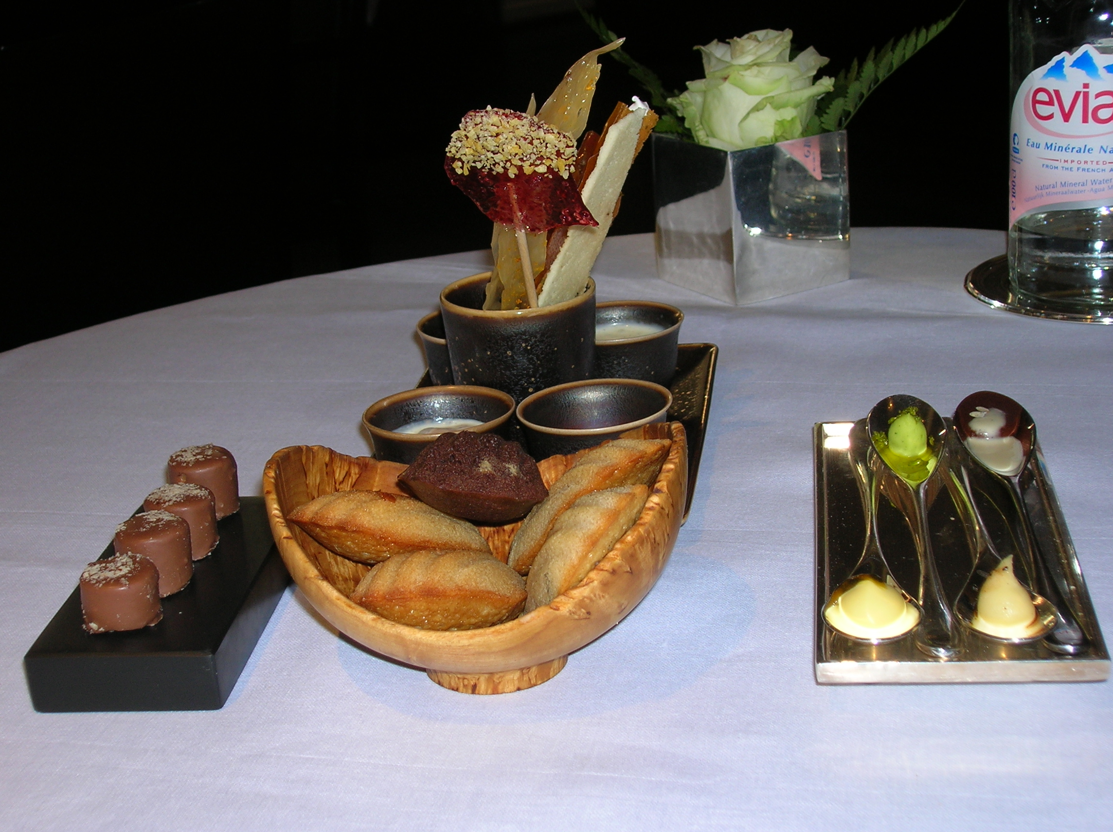 מנות ממסעדת תום איקנס